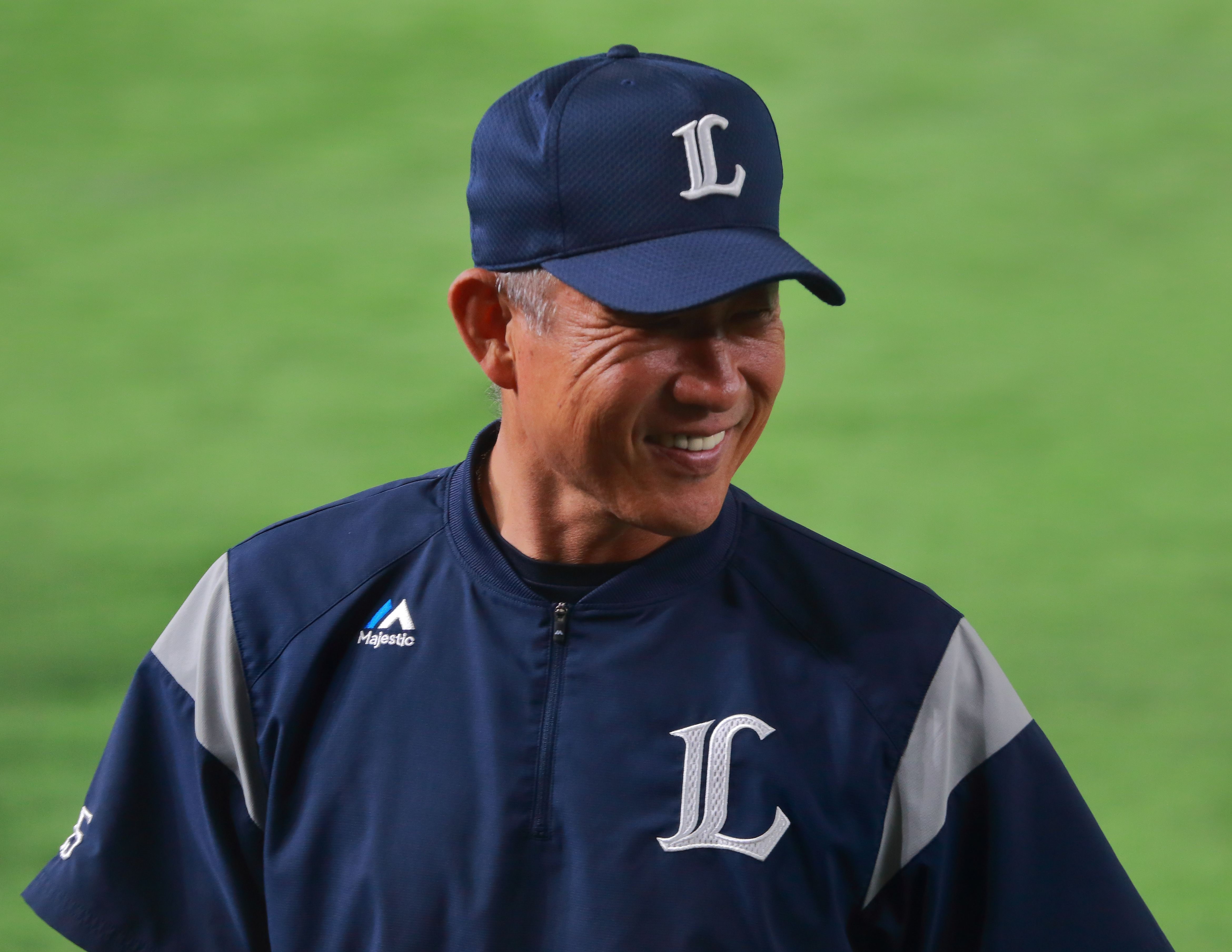 埼玉西武ライオンズ時代の辻発彦。 2018年6月9日、東京ドームにて撮影。